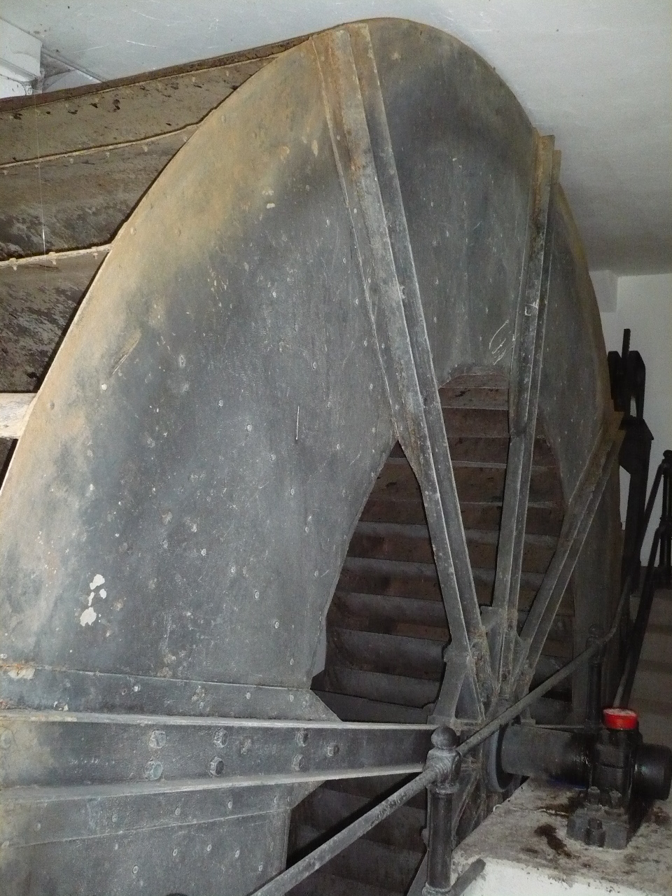 Wasserrad im Pumpenhaus im Schloßpark Nymphenburg in München